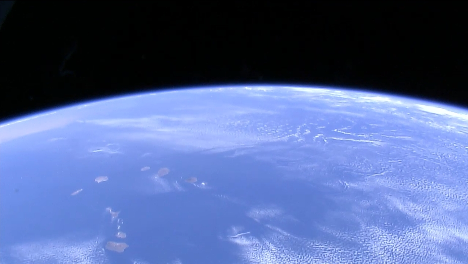 Kapverdische Inseln (Hitachi, forward view)